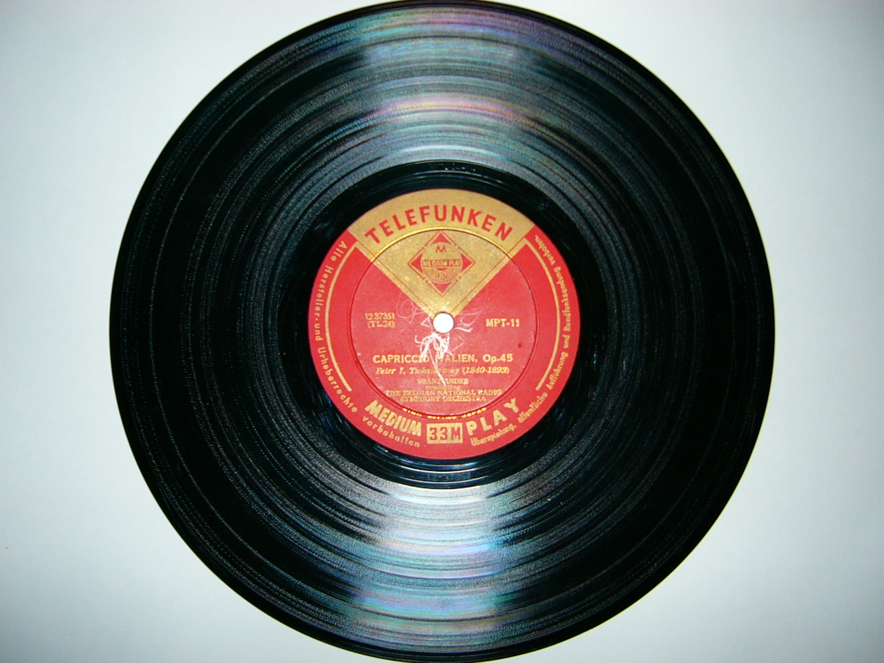 10インチのLPレコード。キングレコード（日本）のテレフンケンレーベル。センター付近の白い線は書き込みではなく、ラベルのキズがストロボで反射している。